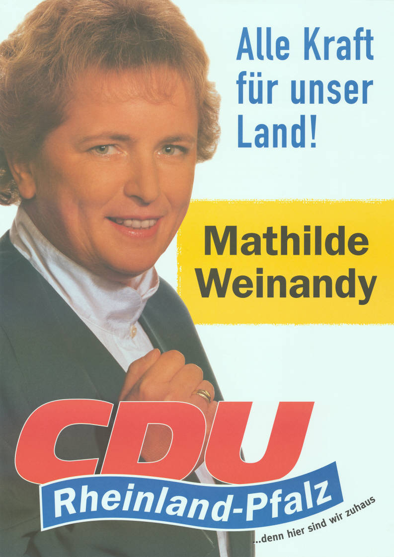 Alle Kraft für unser Land! Mathilde Weinandy CDU Rheinland-Pfalz ... denn hier sind wir zuhaus Abbildung: Porträtfoto mit geballter Faust Plakatart: Kandidaten-/Personenplakat mit Porträt Auftraggeber: CDU Rheinland-Pfalz Objekt-Signatur: 10-010 : 918 Bestand: Landtagswahlplakate Rheinland-Pfalz (10-010) GliederungBestand10-18: Landtagswahlplakate Rheinland-Pfalz (10-010) » CDU Lizenz: KAS/ACDP 10-010 : 918 CC-BY-SA 3.0 DE